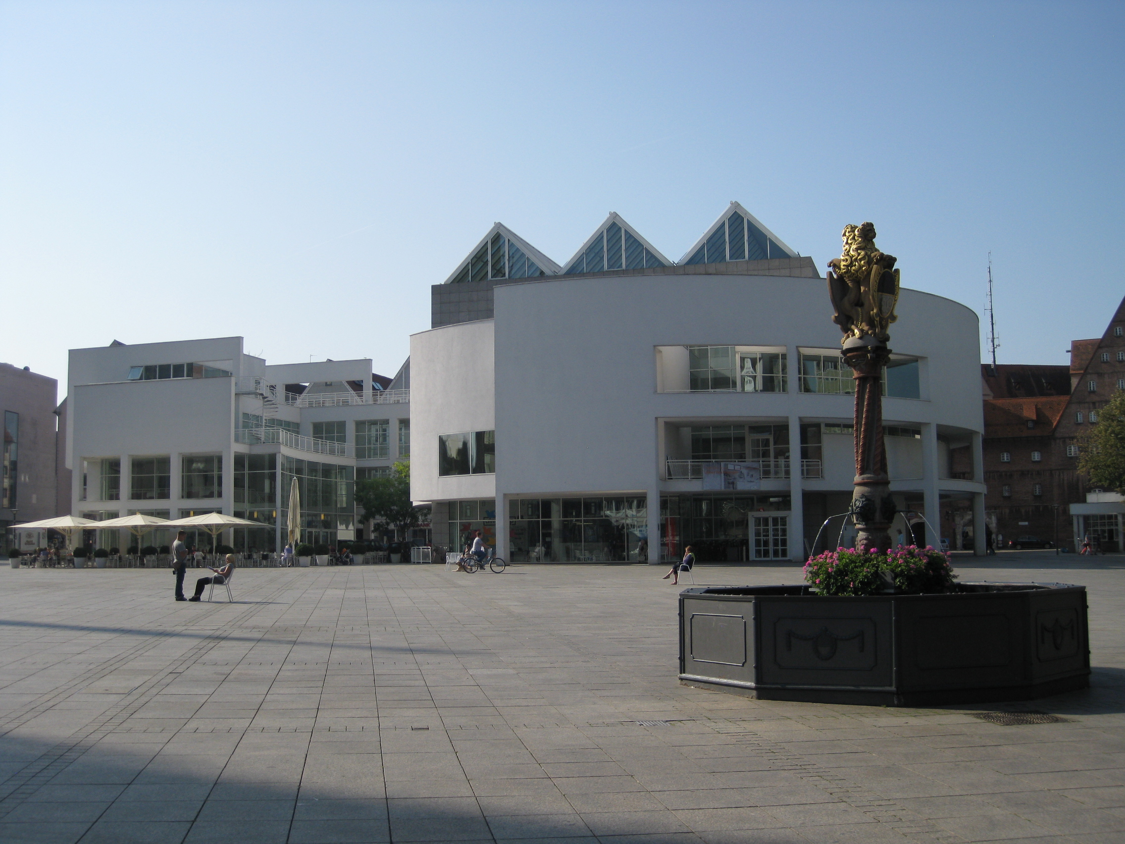 Stadthaus Ulm ( Münsterplatz 50, D-89073 Ulm. Das Foto stellt das Stadthaus vom Münsterplatz aus gesehen dar, davor der Löwenbrunnen (